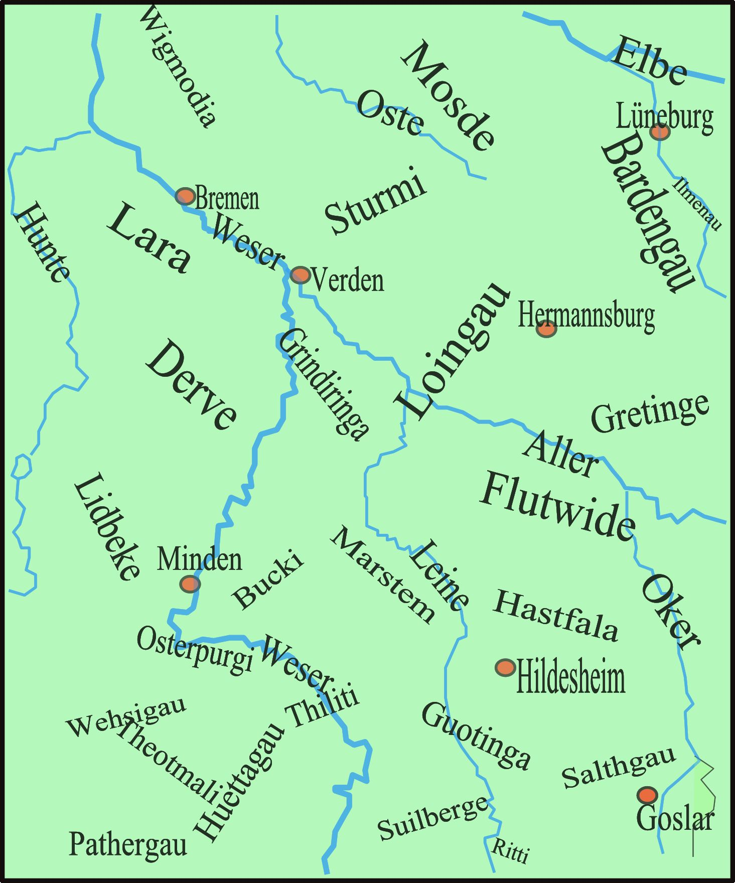 Die Karte zeigt den Loingau und die umliegenden Gaue des Herzogtums Sachsen um 1000, nach: Werner Kaemling, Atlas zur Geschichte Niedersachsens, Braunschweig 1987